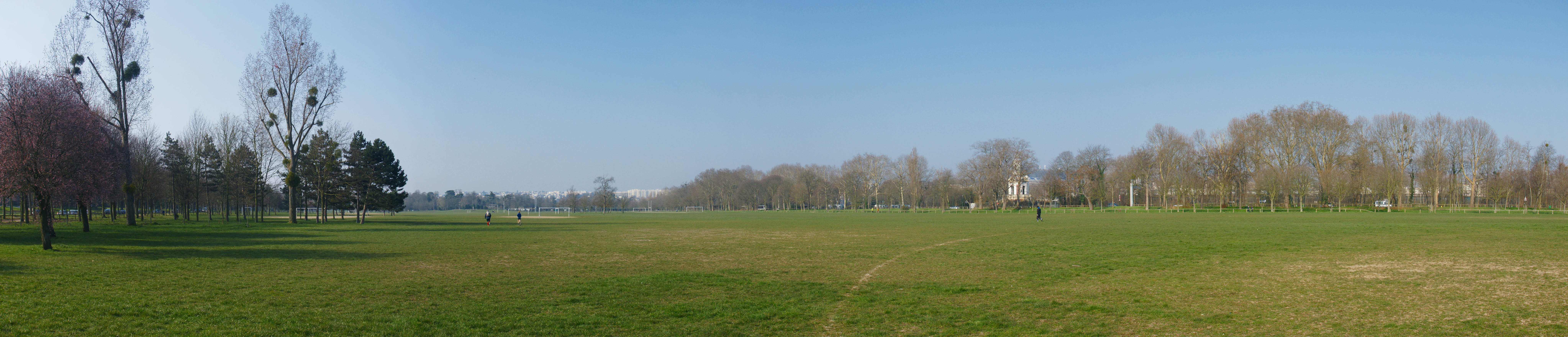 Vista panorâmica no Campo de Jogos de Bagatelle.